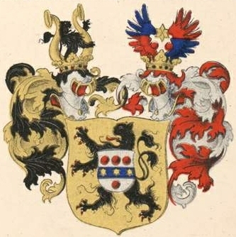 Sieversi suguvõsa vabahärravapp